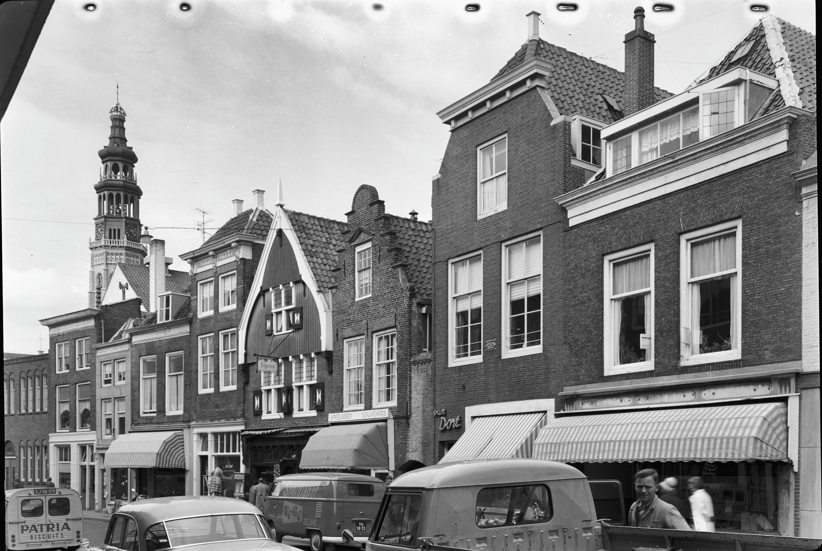 straatwand